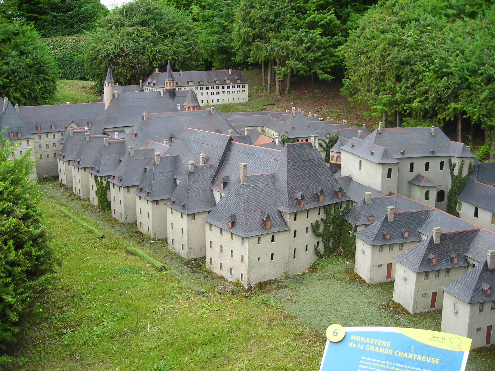 Maquette du monastère de la grande chartreuse à France Miniature (Élancourt)